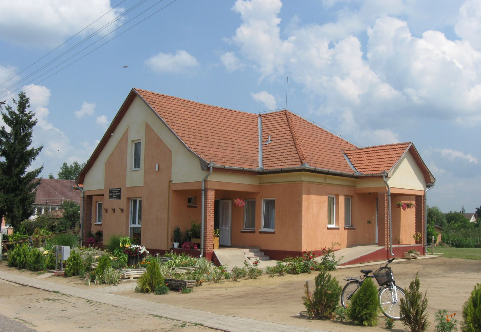 Alapszolgáltatási Központ épülete, Szakoly, Szabolcs-Szatmár-Bereg megye